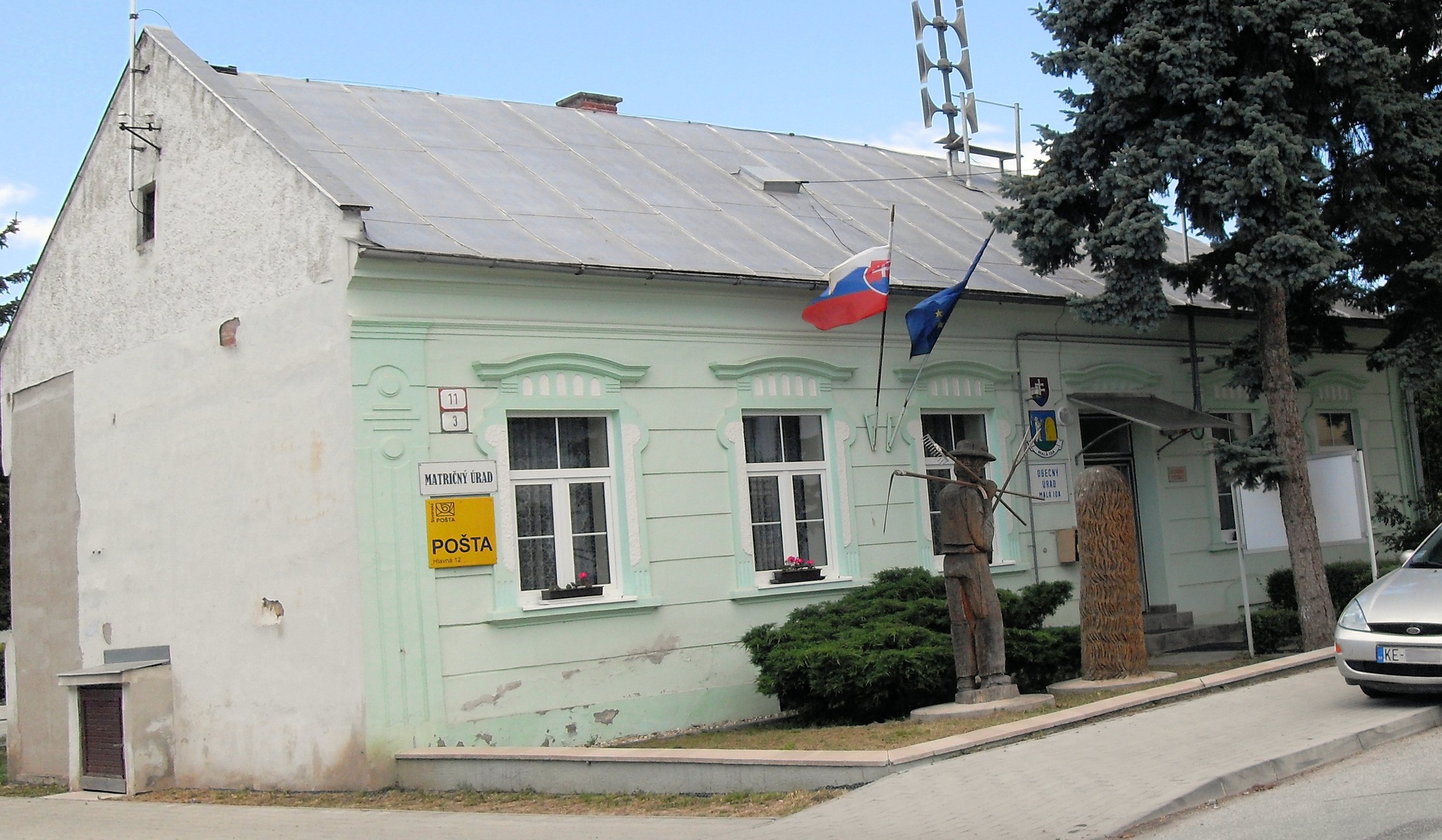 Obecný úrad a pošta v Malej Ida